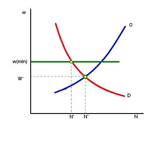 Com afecta el salari mínim a la contractació de treballadors